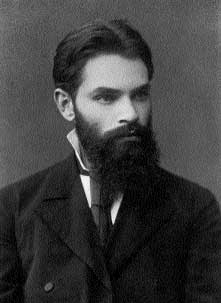 Alexander Ljapunow jung